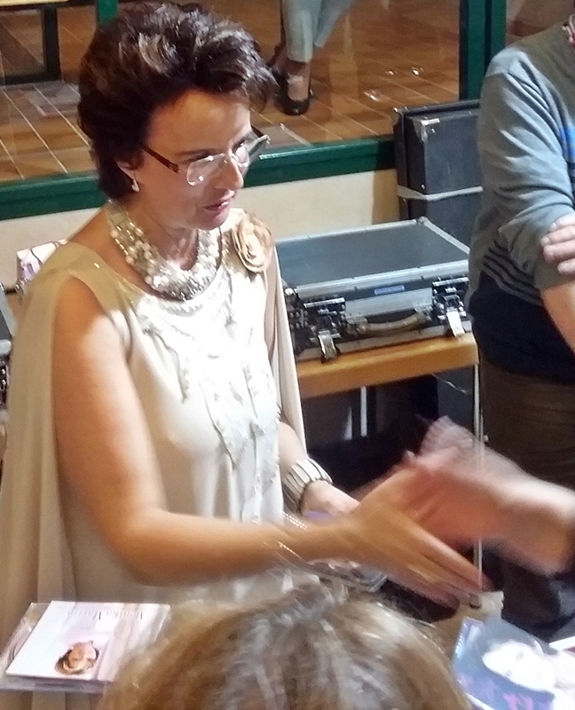 Monika Martin beim „Die Große Schlager-Hitparade 2017“ in Erkner